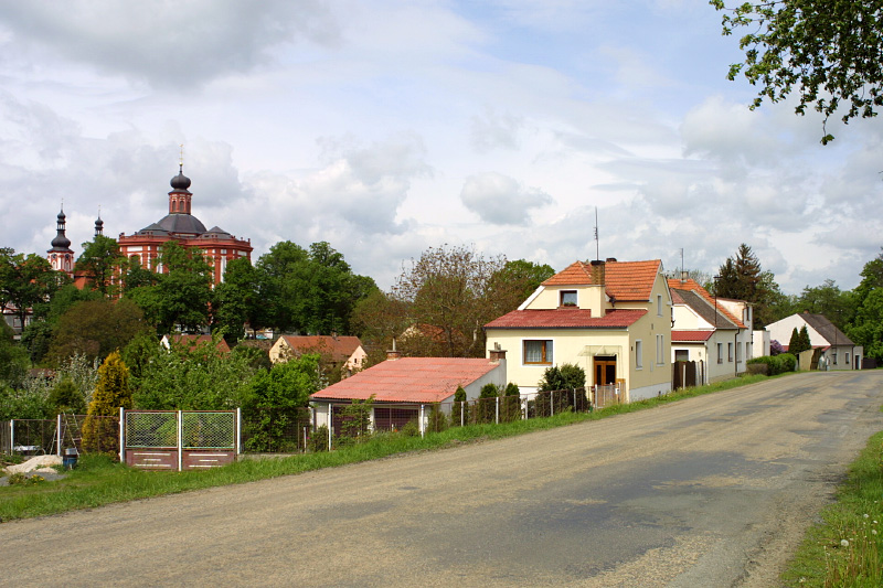 Mariánský Týnec, vlevo v pozadí Mariánská Týnice, proboštství a poutní kostel Zvěstování Panny Marie cisterciáckého kláštera v Plasích.